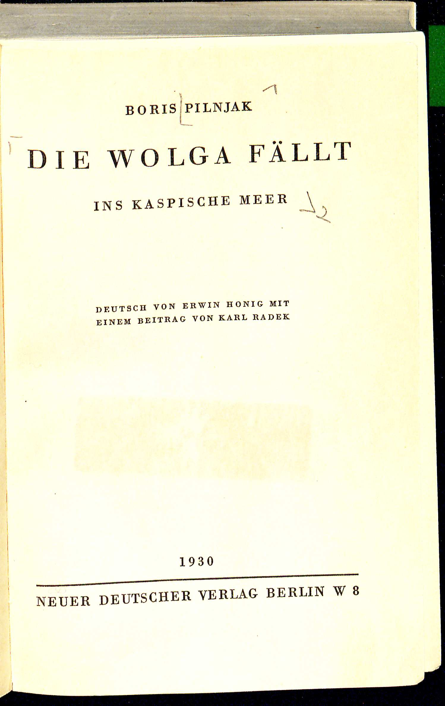 Boris Pilnjak Die Wolga fällt ins Kaspische Meer, Übersetzung 1930 Neuer Deutscher Verlag